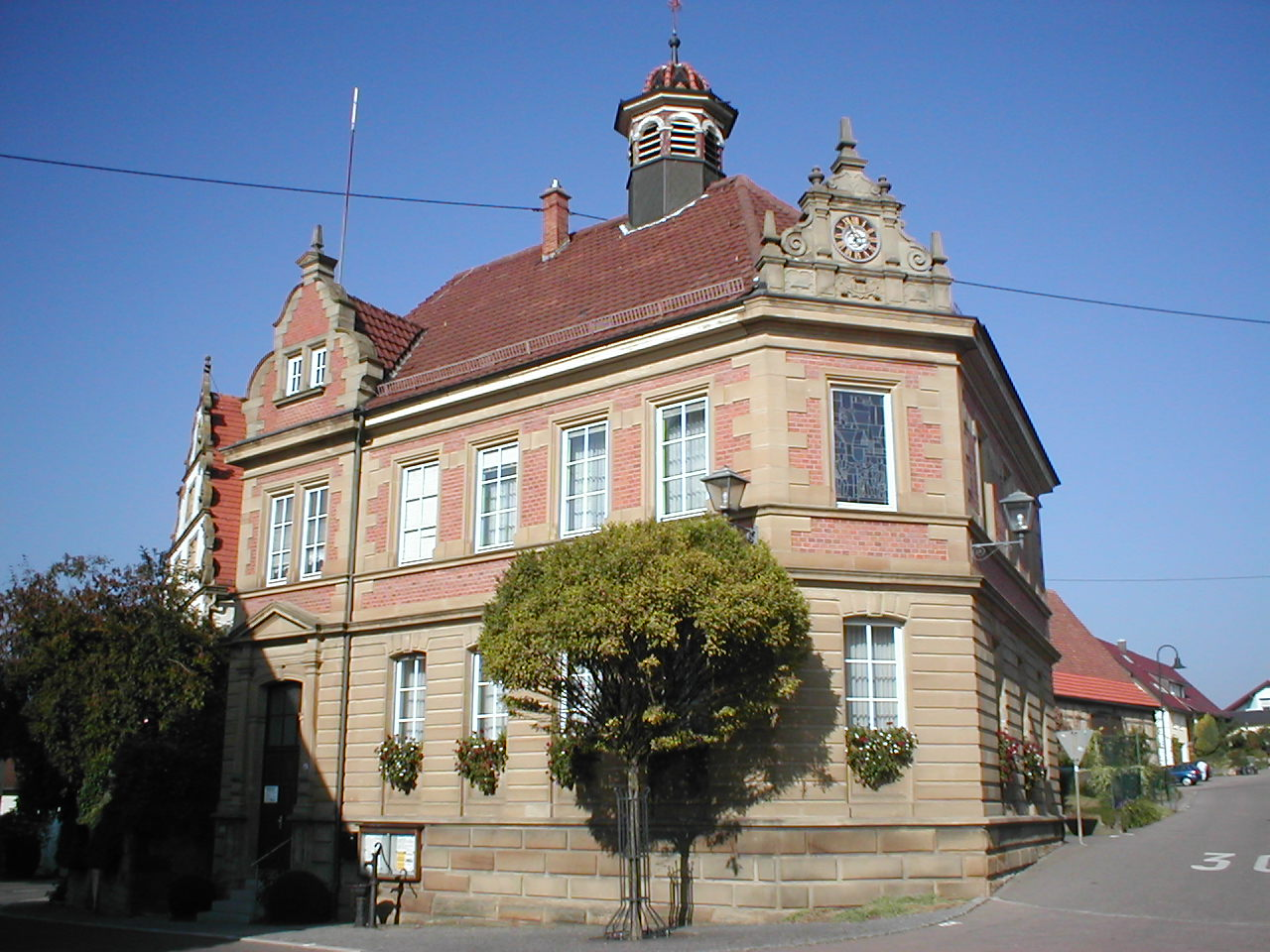 Rathaus von Langenbrettach-Brettach, erbaut 1888